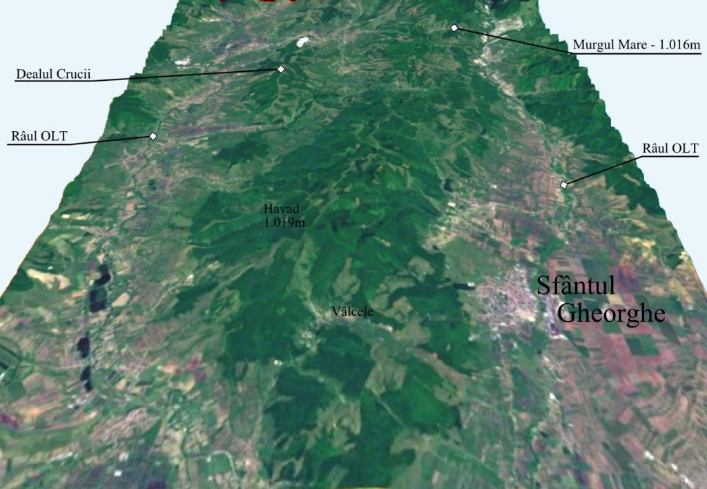 Muntii Baraoltului 3D. Imagine realizata cu date SRTM si textura World Imagery.